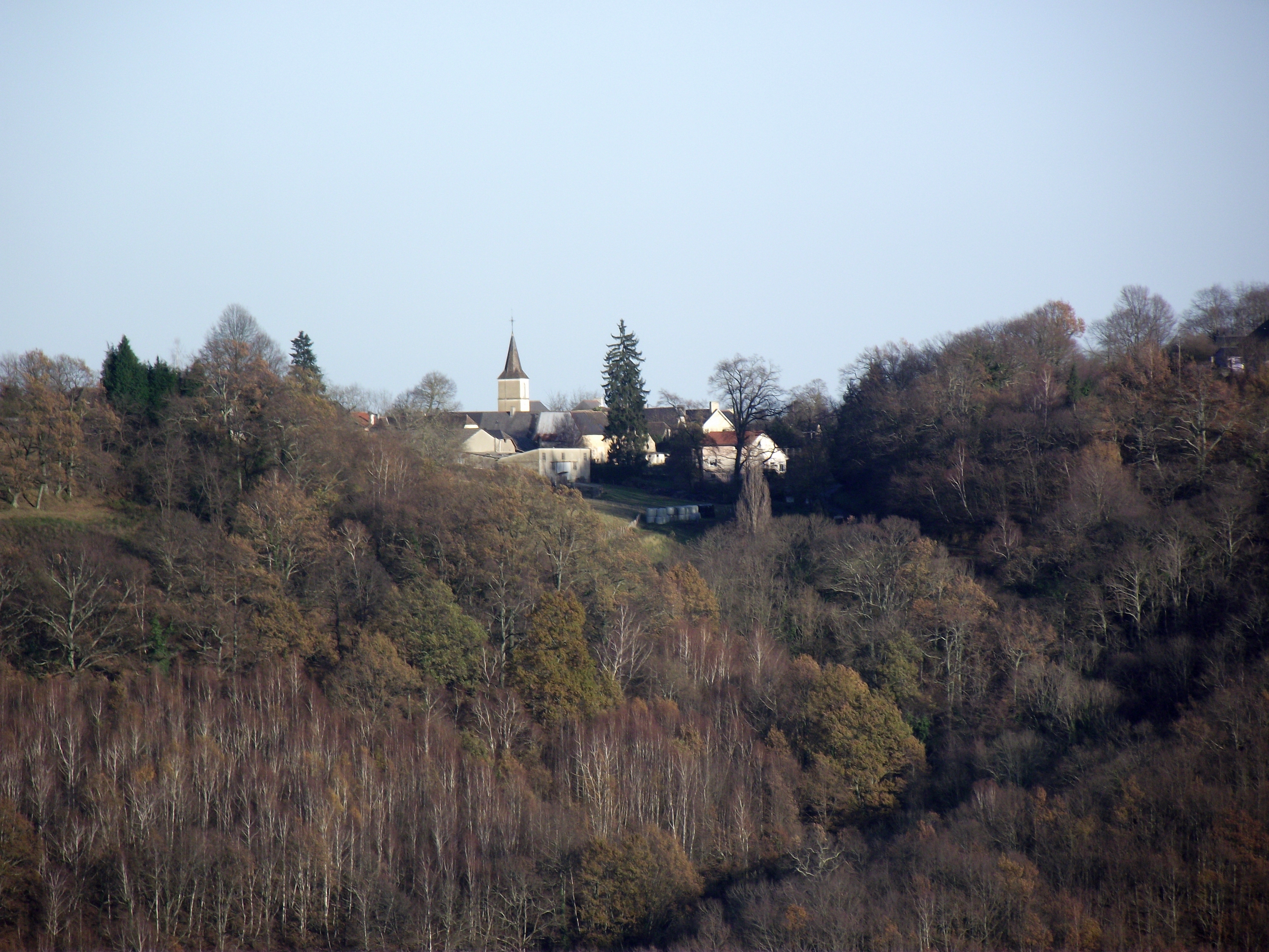 Layrisse (Hautes-Pyrénées, France)